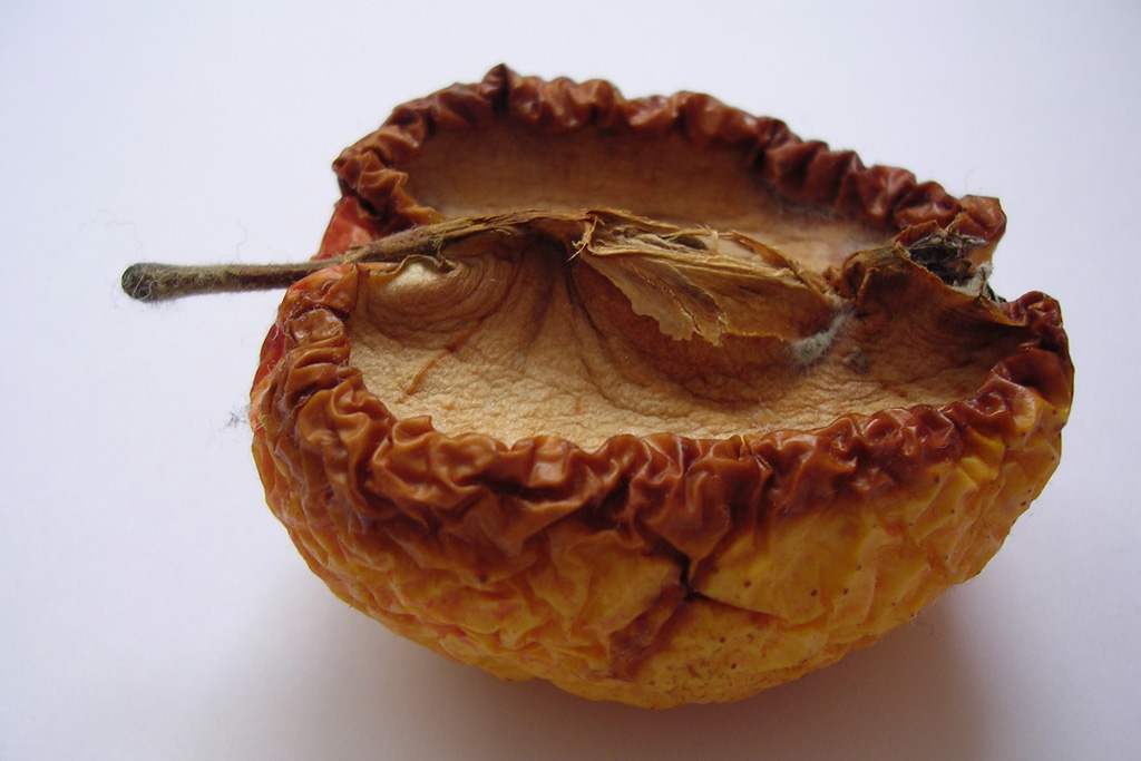 verschimmelt apfel, mouldy apple